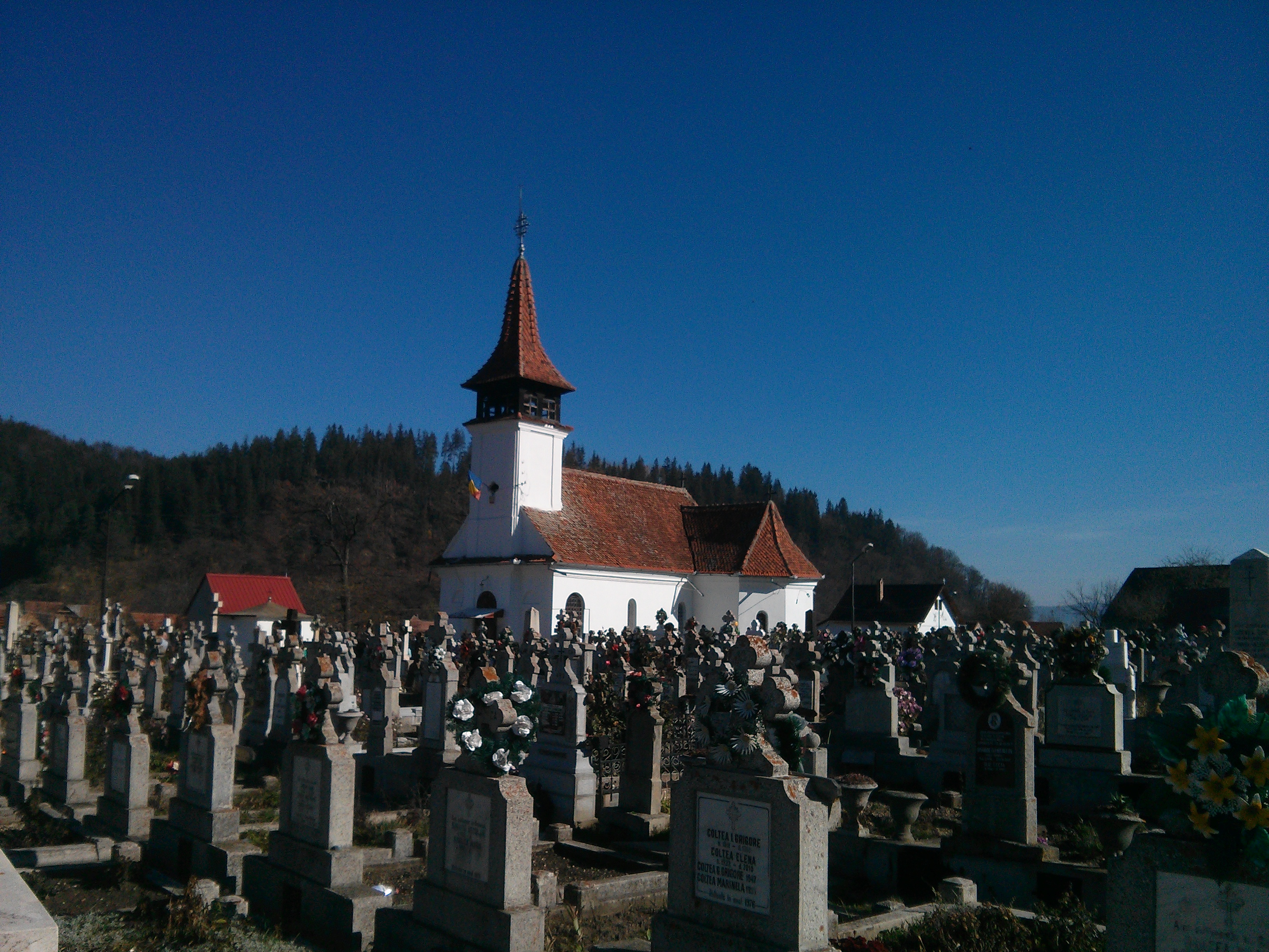 Biserica „Nașterea Maicii Domnului”